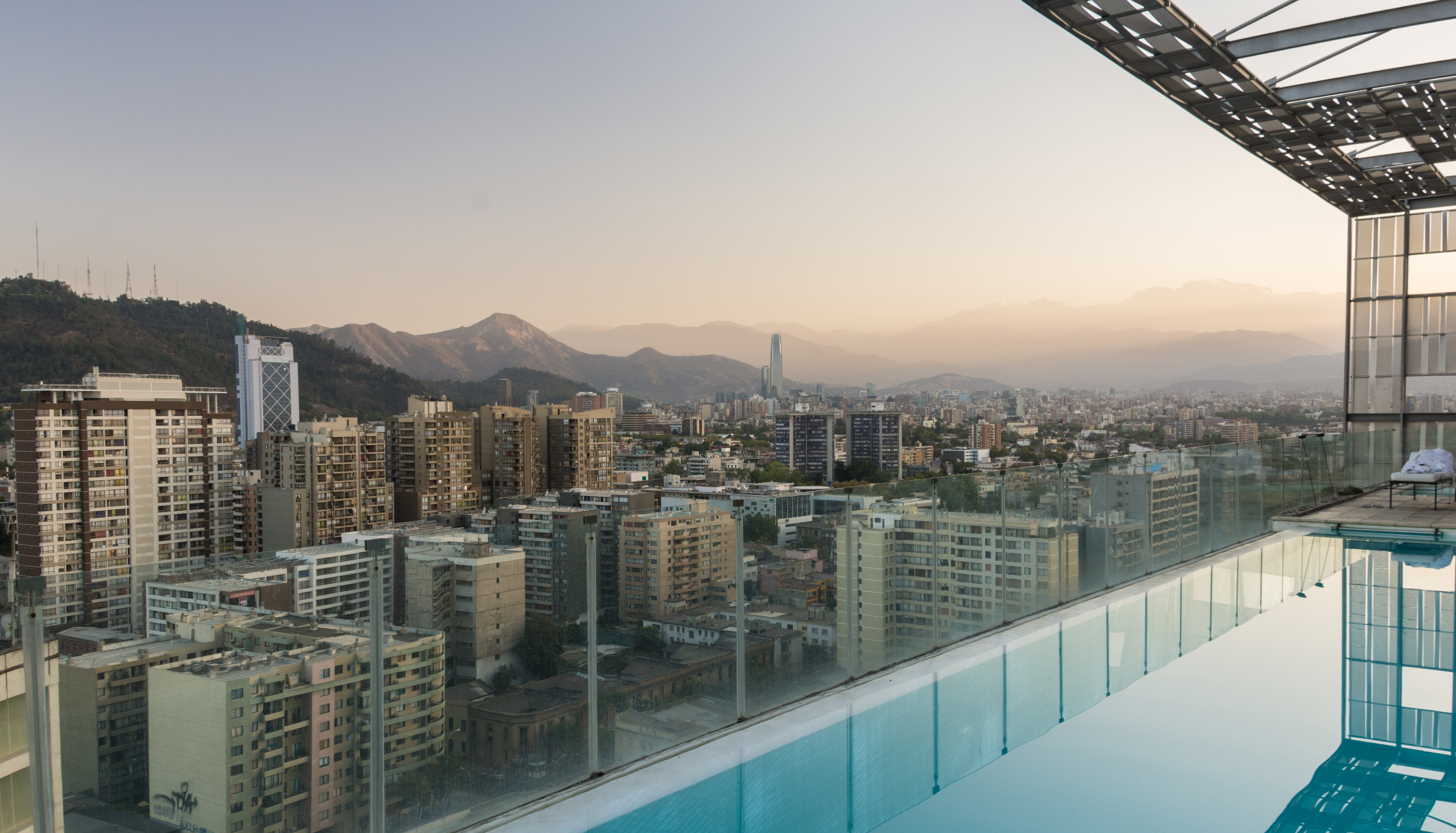 Santiago